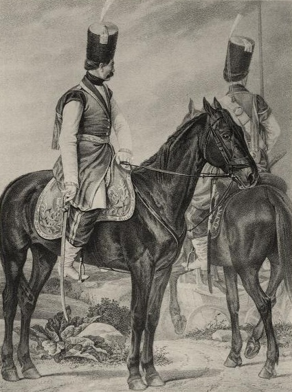 Офицер и Рядовой Чугуевской Конвойной Казачьей Команды, с 1776 по 1790 год. (В Парадной форме).